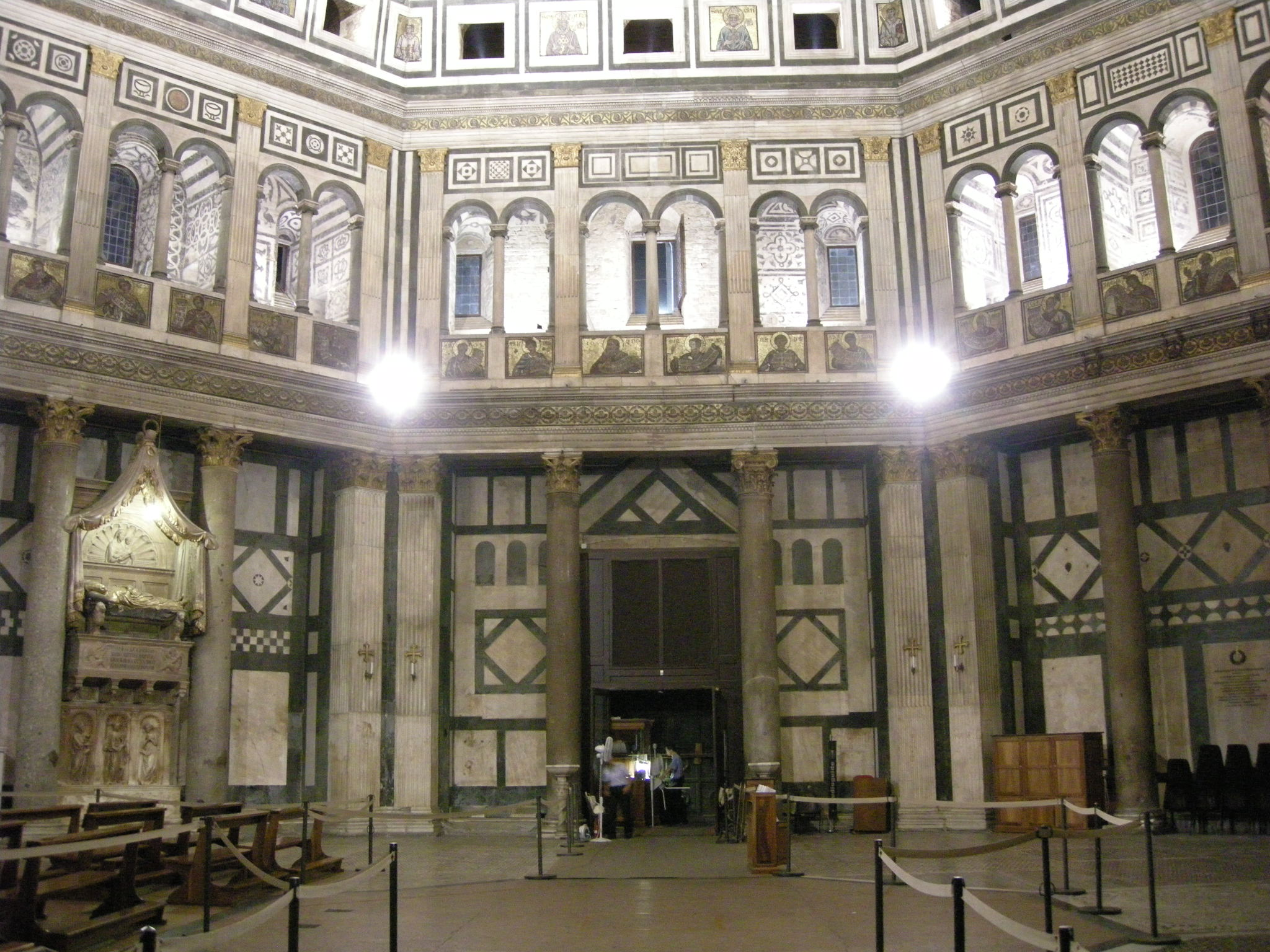 Battistero di firenze, interno 04, porta nord